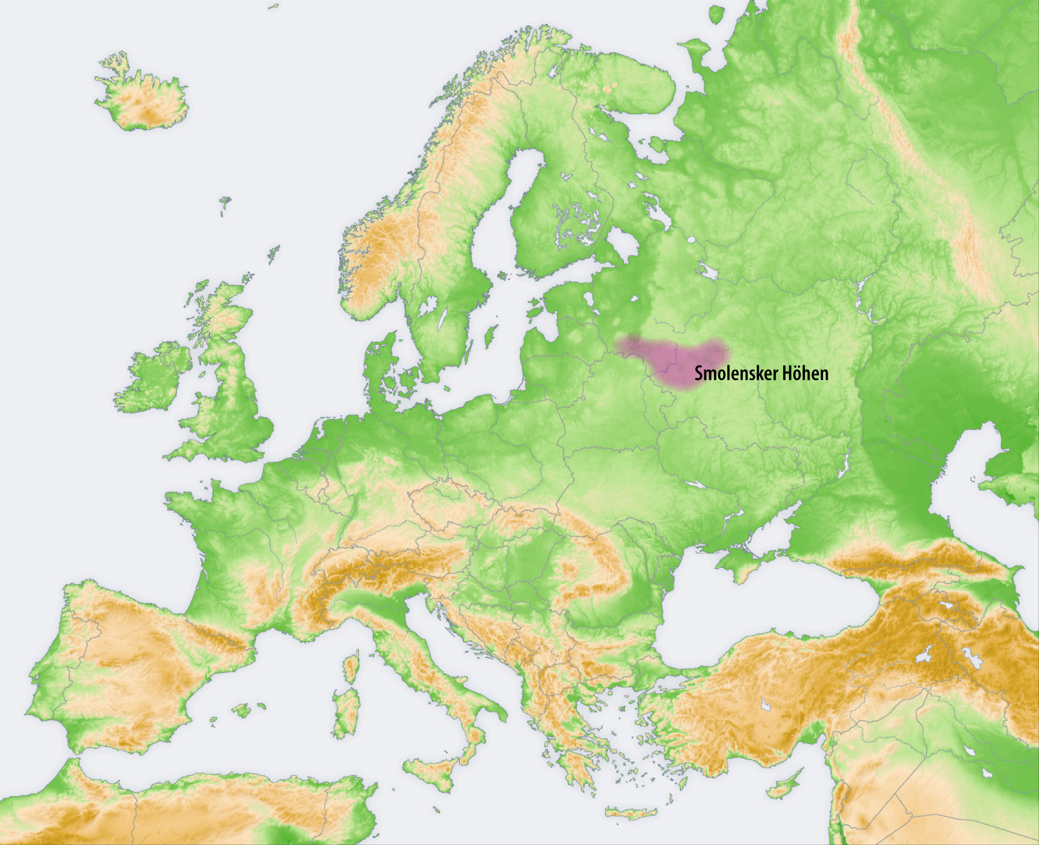 Landschaften der Osteuropäischen Ebene: Smolensker Höhen